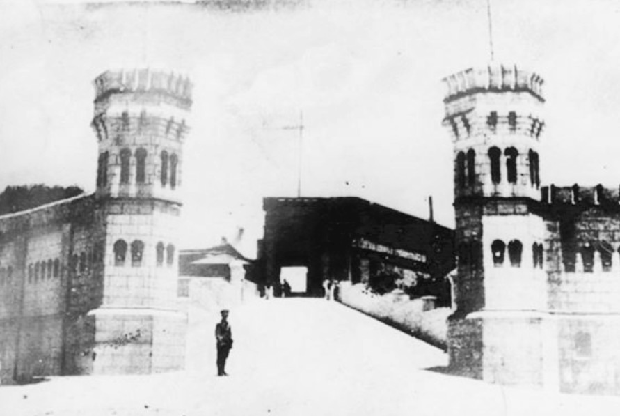 Castillo de Matamoros, Ciudad de Guatemala en la década de 1900.